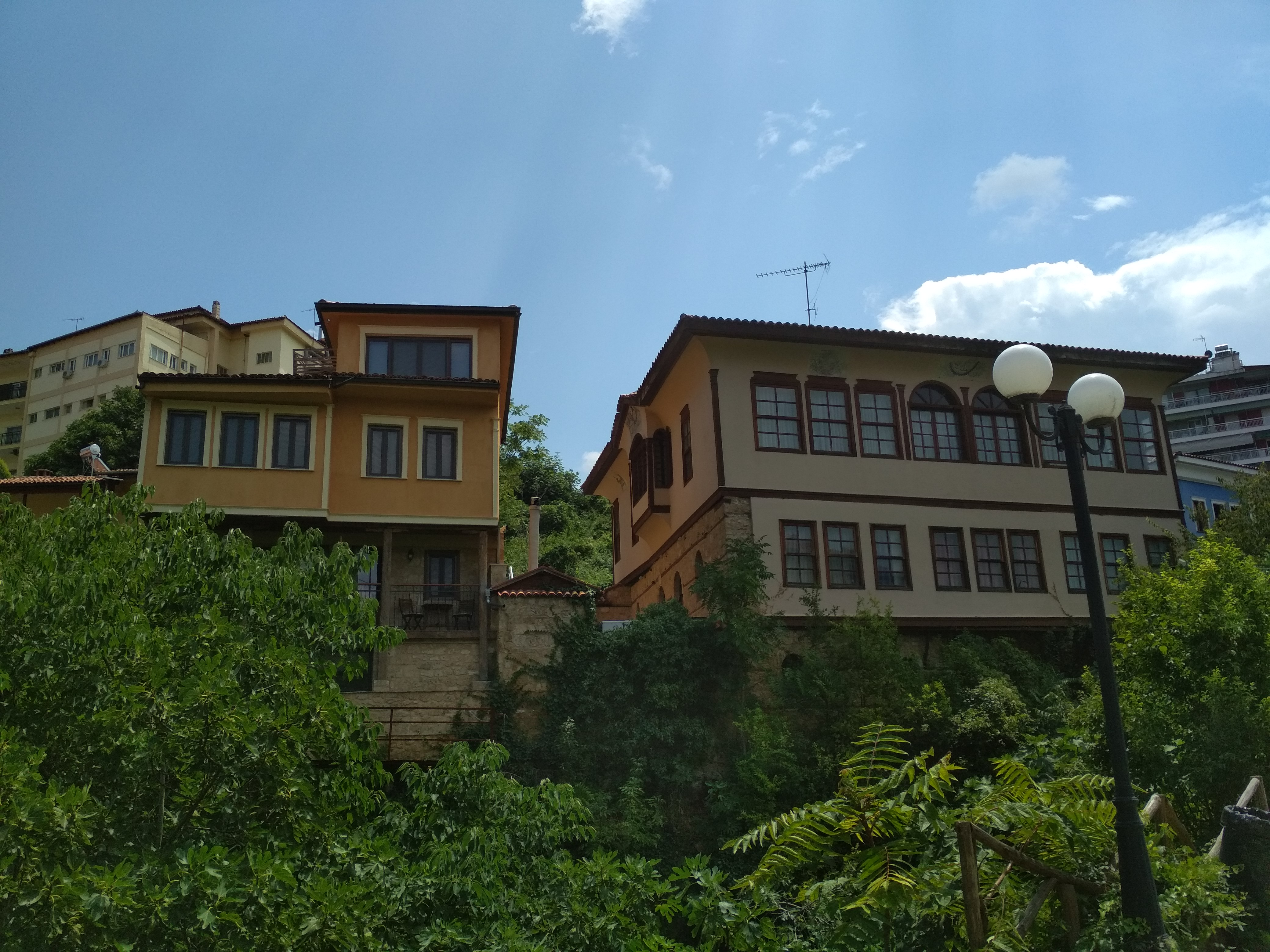 Εβραϊκή Συνοικία "Μπαρμπούτα", Βέροια«Εβραϊκή Συνοικία Μπαρμπούτα, Βέροια»